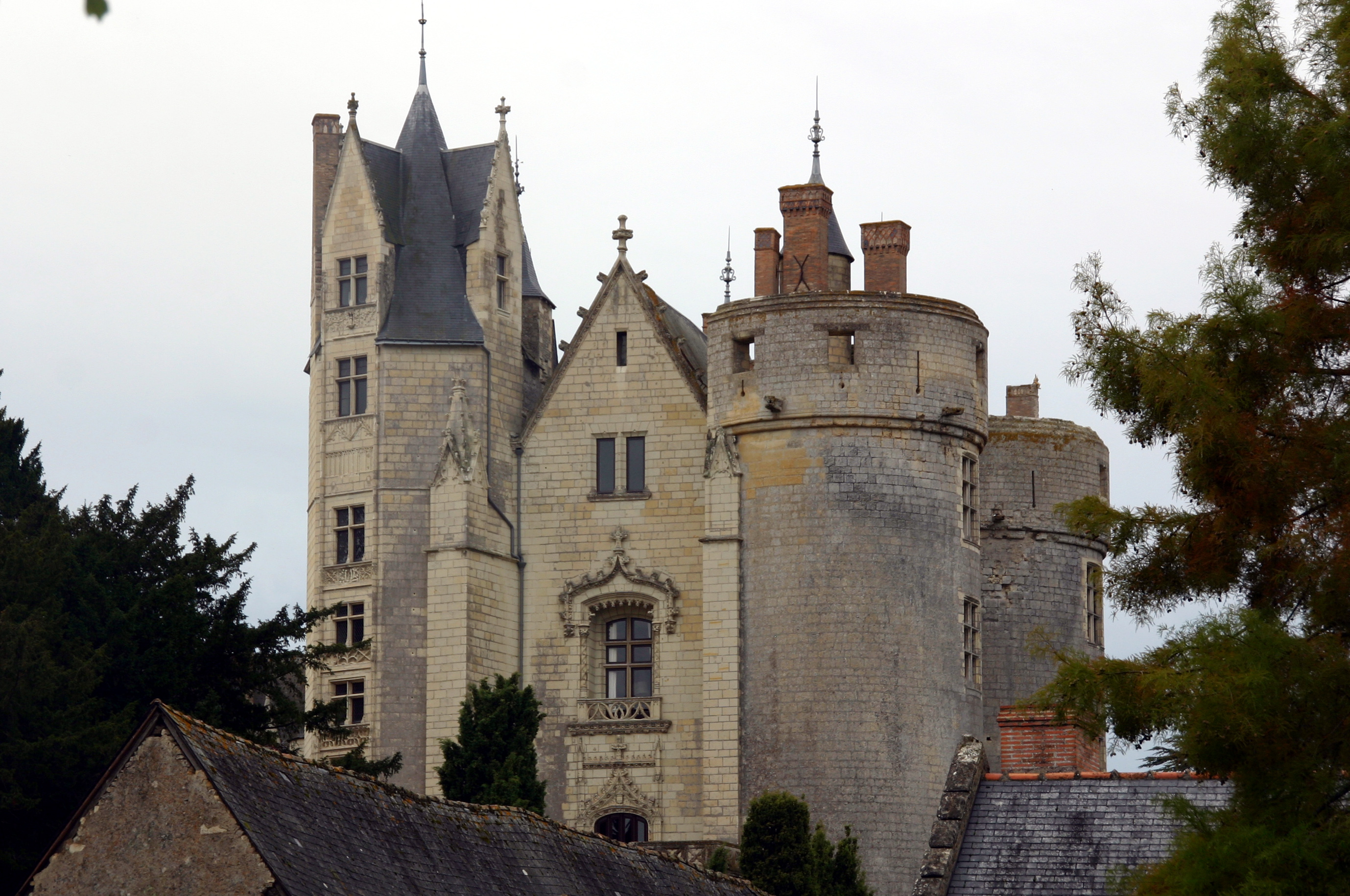 Schloss Montreuil-Bellay